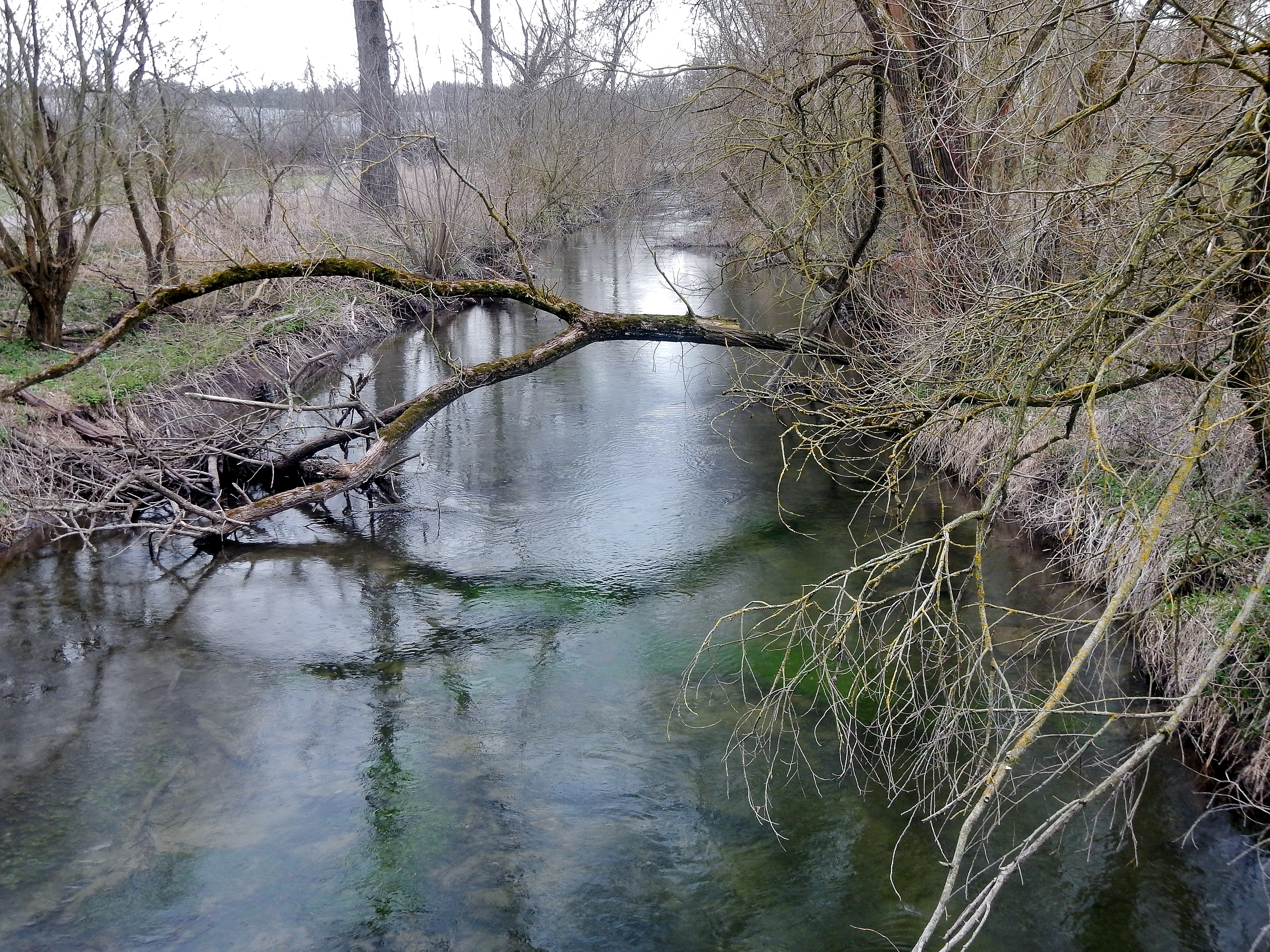 Schwarzach